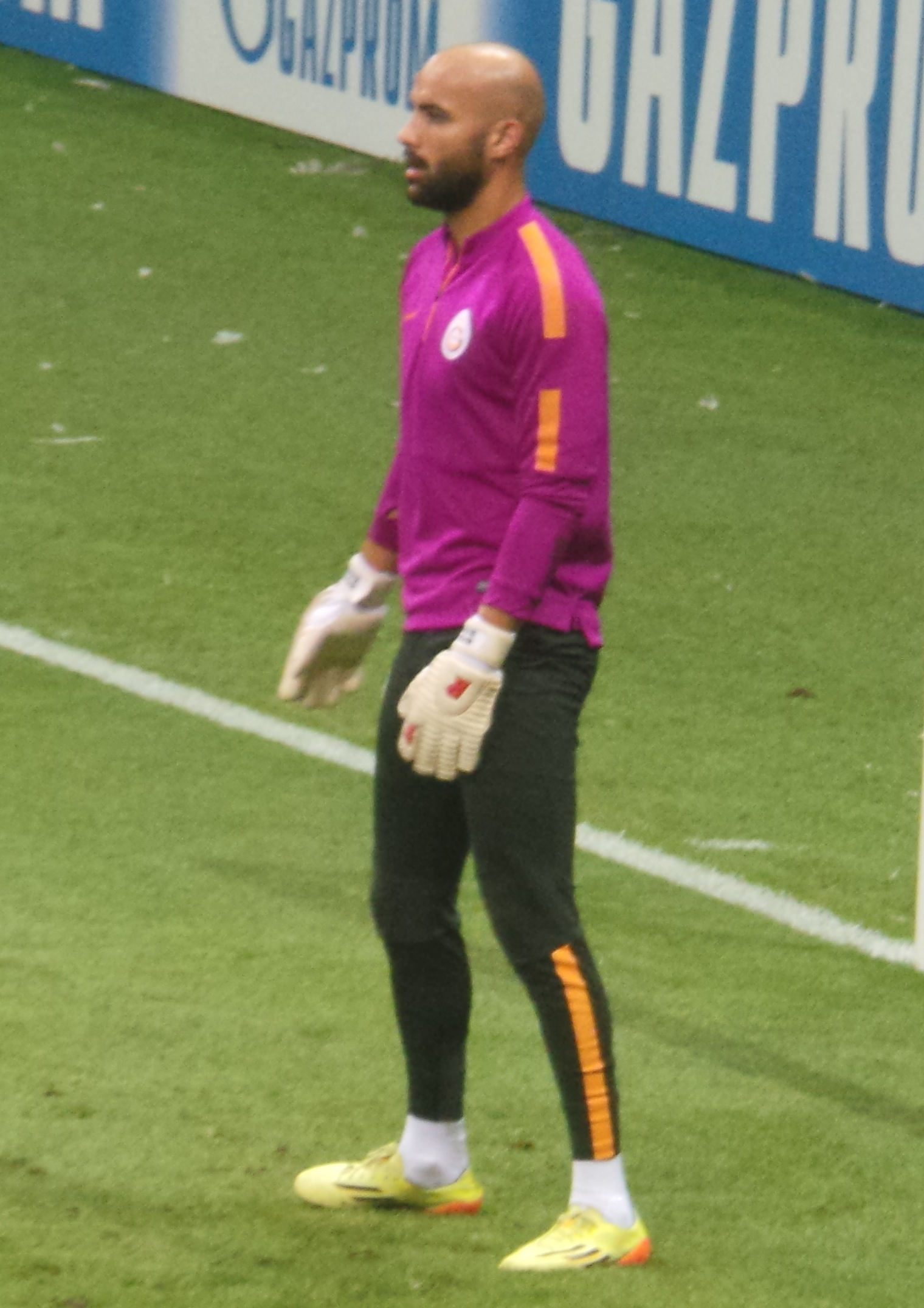 Sinan Bolat GS